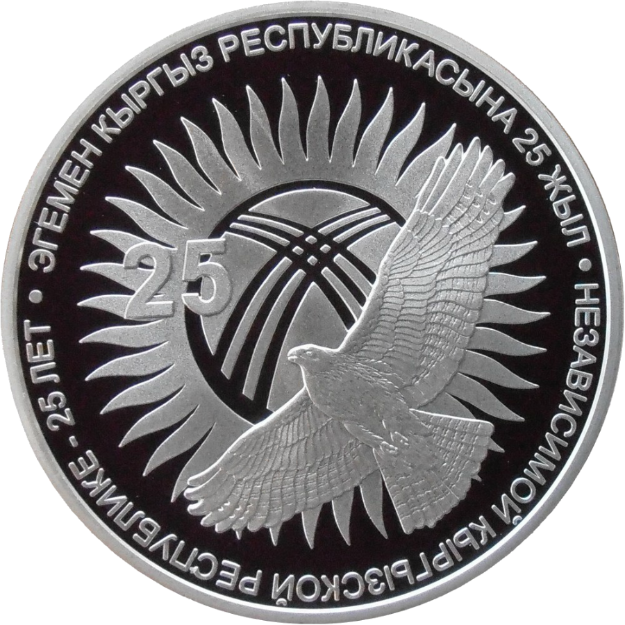 Памятная монета Кыргызстана - Независимой Кыргызской Республике - 25 лет - 10 сом - 2015 - серебро 925. Аверс